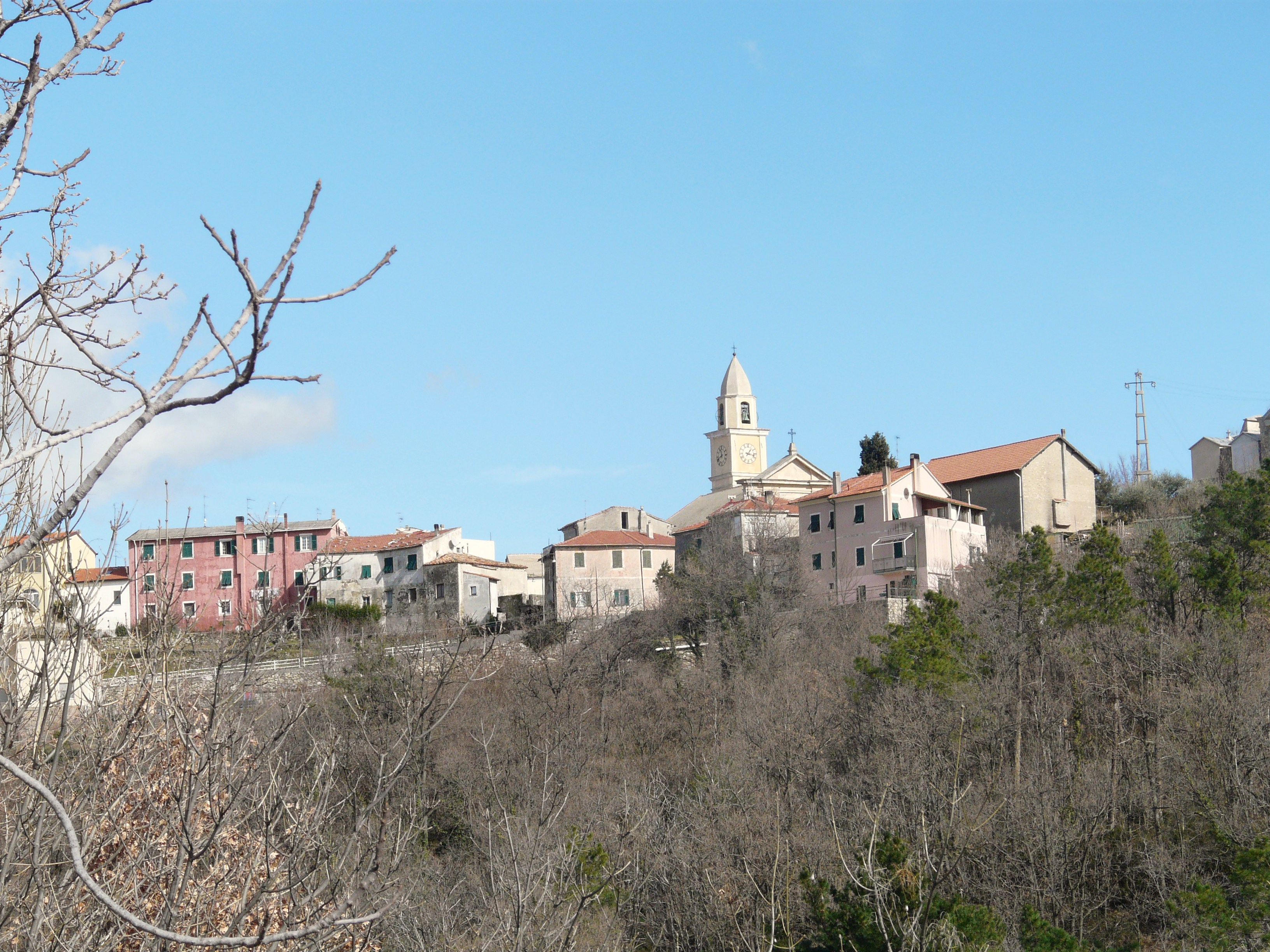 Panorama di Orco, Orco Feglino, Liguria, Italia